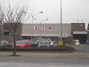 filiaal van Delhaize in Eupen